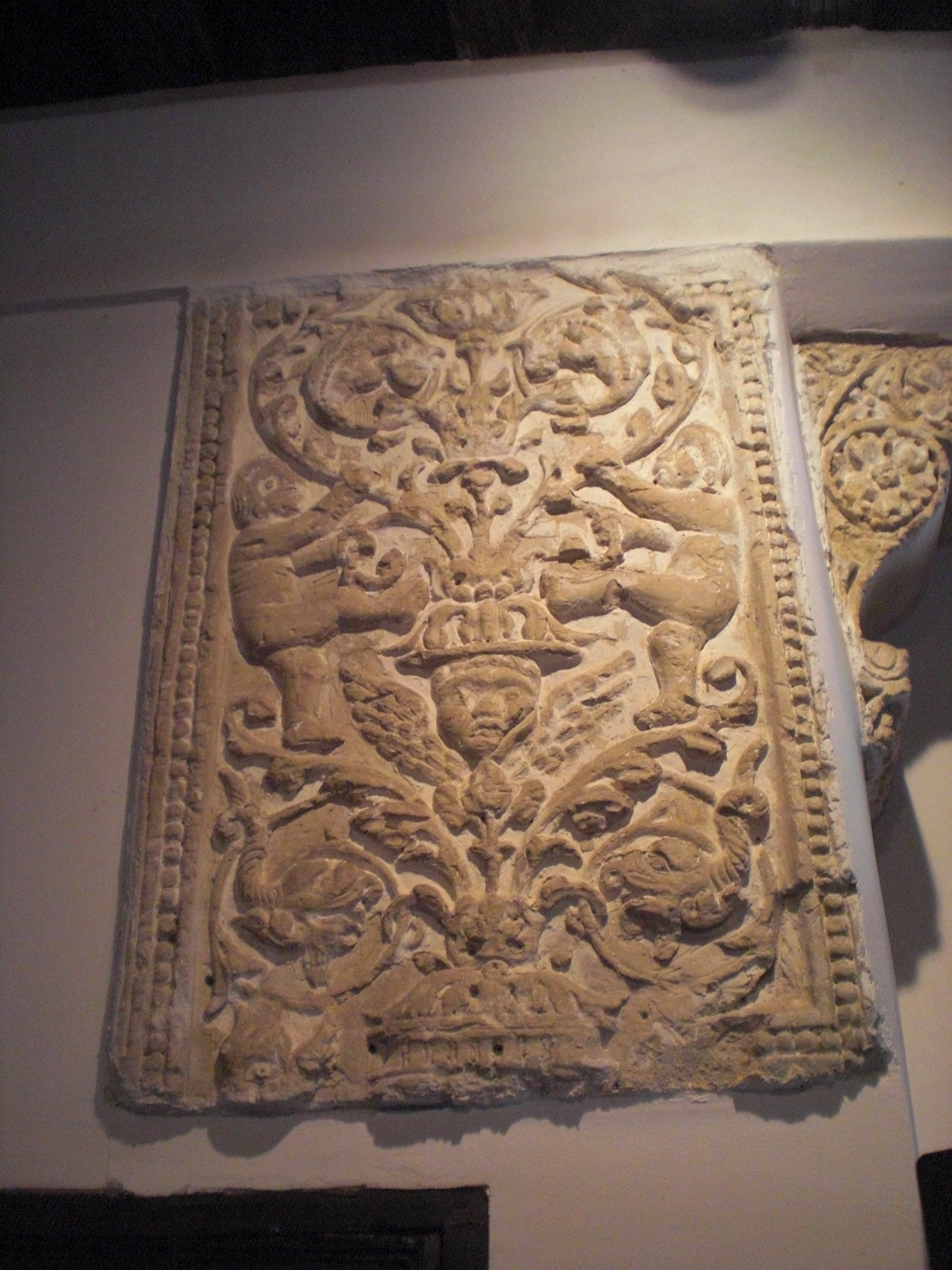 Renesanca ornama detalo de la Muzeo El Greko en Toledo